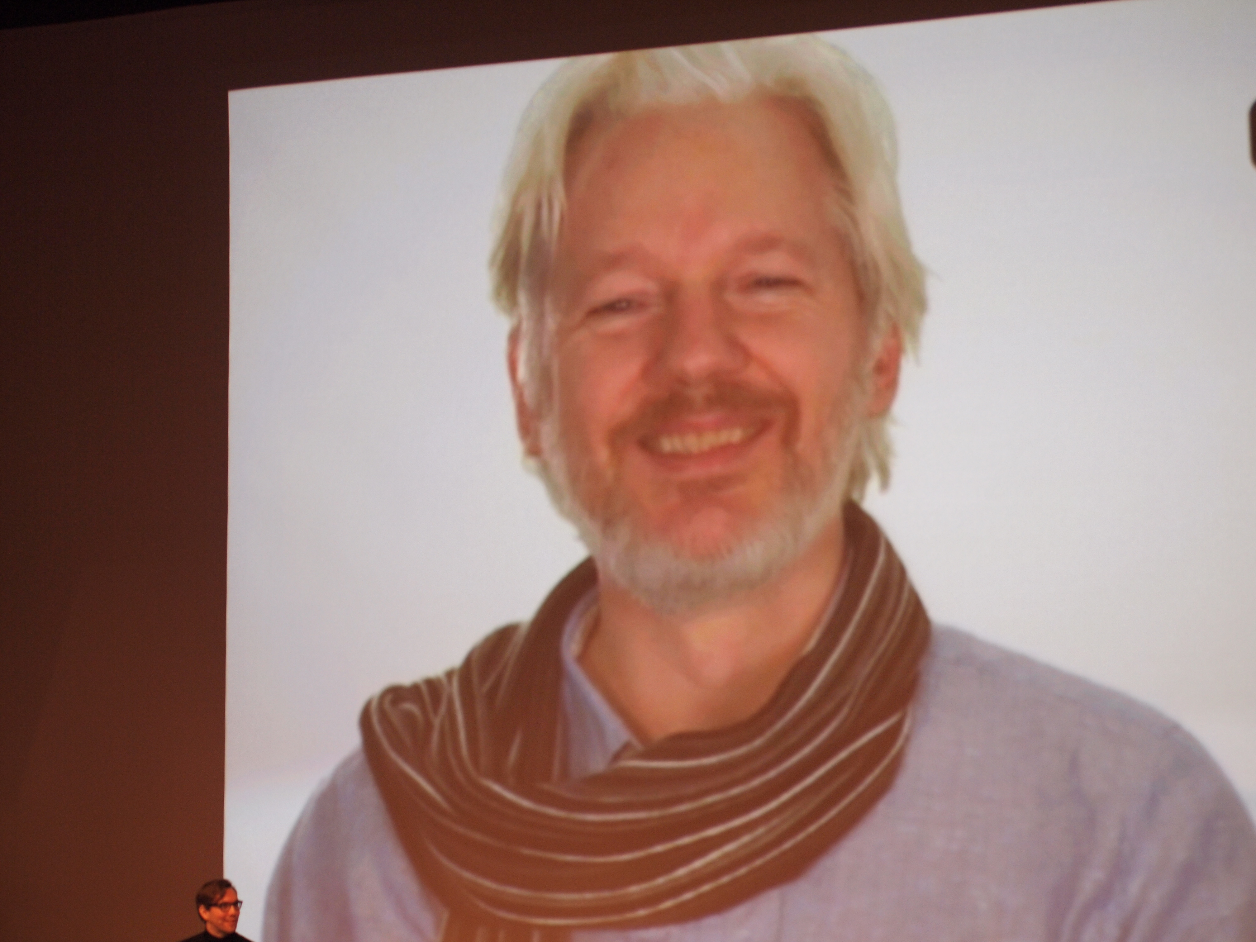 30C3: Jacob Appelbaum mit einer Video-Zuschaltung von Julian Assange